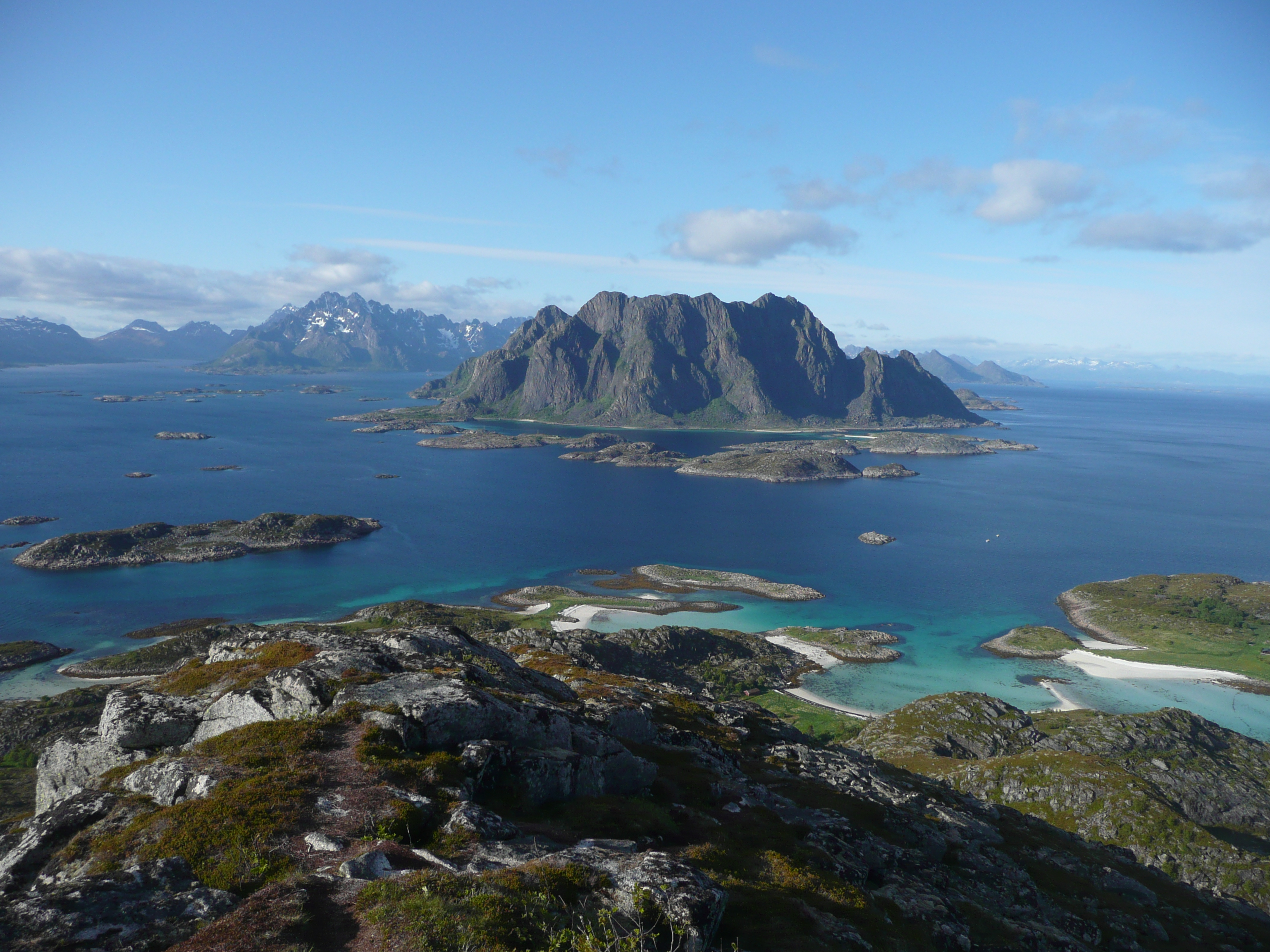 vue sur la montagne de Litlmolla à partir du sommet de l'île